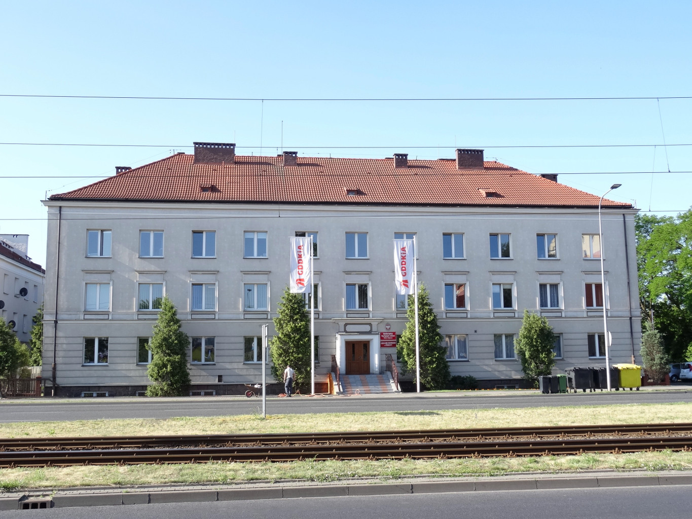 Siedziba kujawsko-pomorskiego oddziału Generalnej Dyrekcji Dróg Krajowych i Autostrad oraz Zarządu Dróg Wojewódzkich - ul. Fordońska 6 w Bydgoszczy